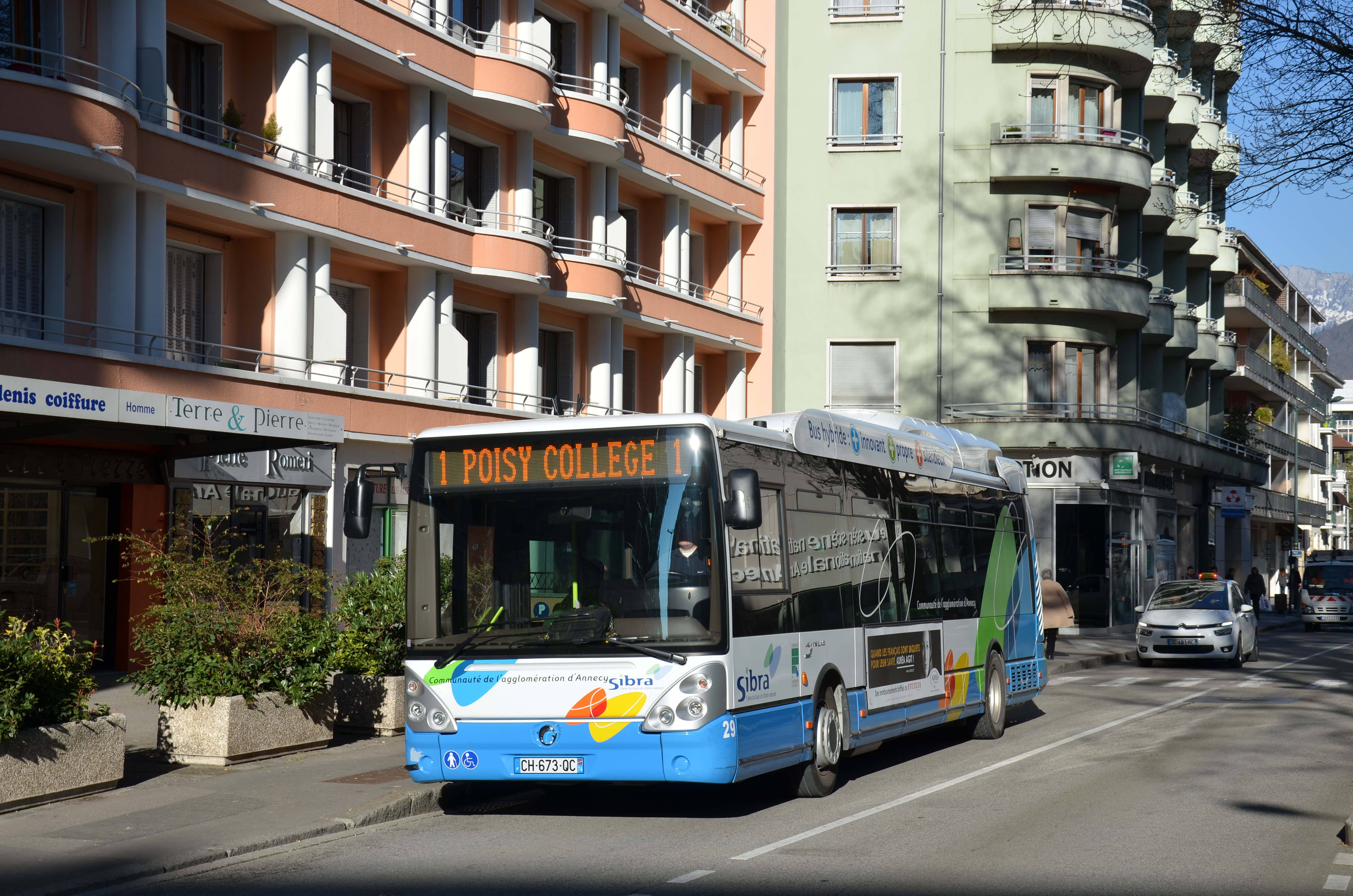 Irisbus Citelis 12 Hybride n°29 sur la ligne 1 du réseau SIBRA d'Annecy, près de l'arrêt Bonlieu.